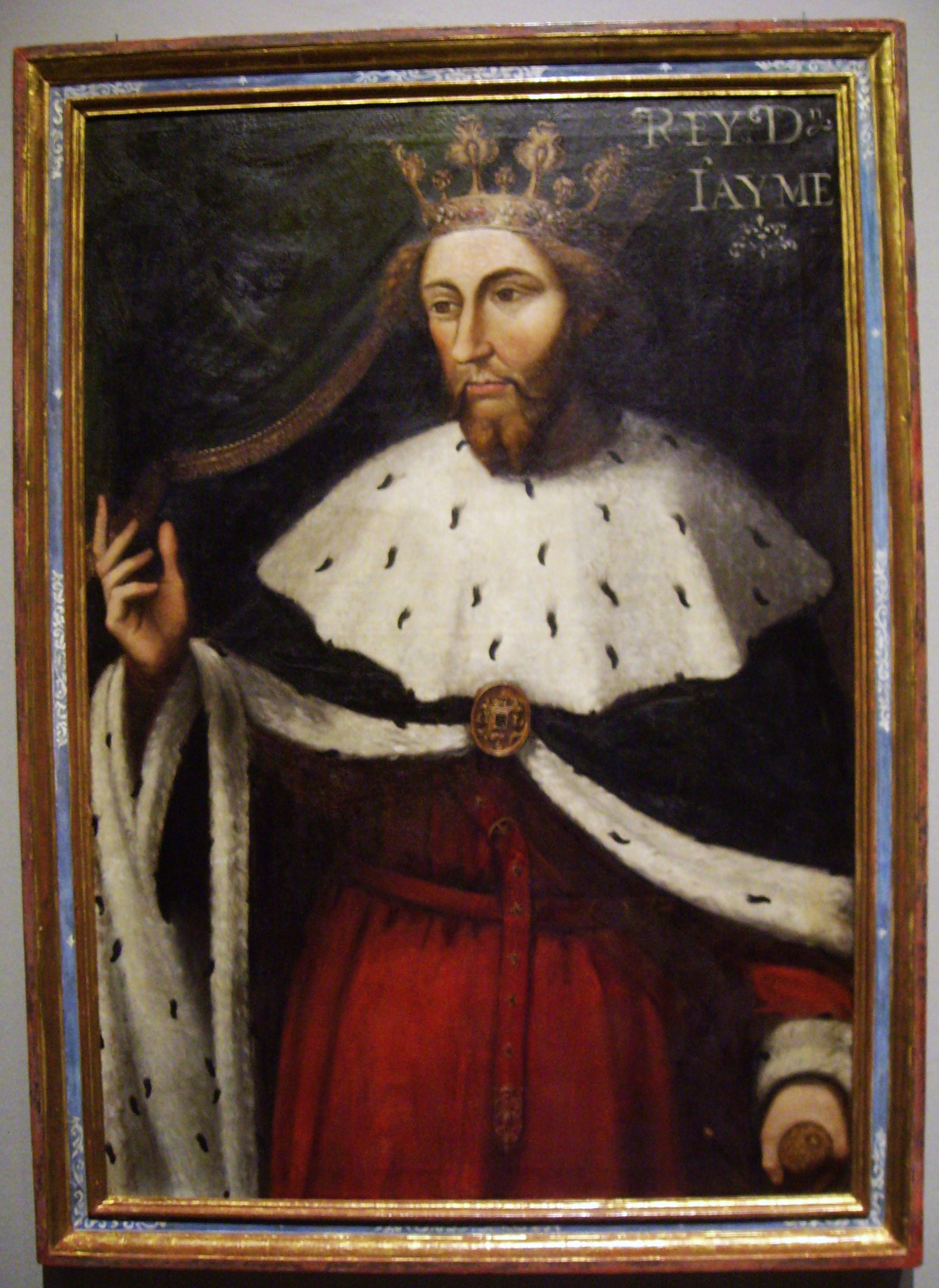 Retrato imaginario del rey Jaime I de Aragón (1208-1276), que fue hijo del rey Pedro II de Aragón y de la reina María de Montpellier.